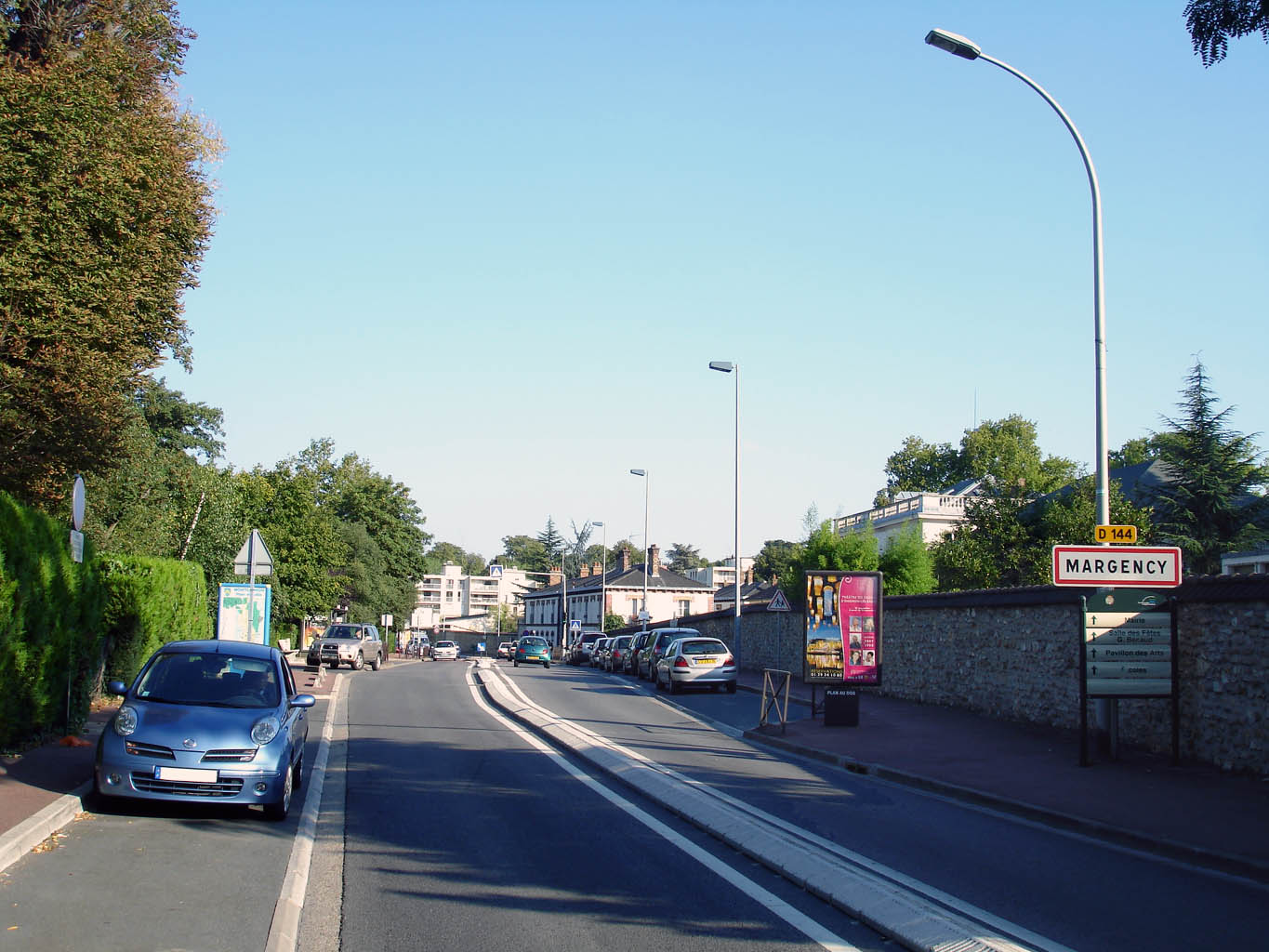 L'avenue Georges-Pompidou à Margency (Val-d'Oise), France